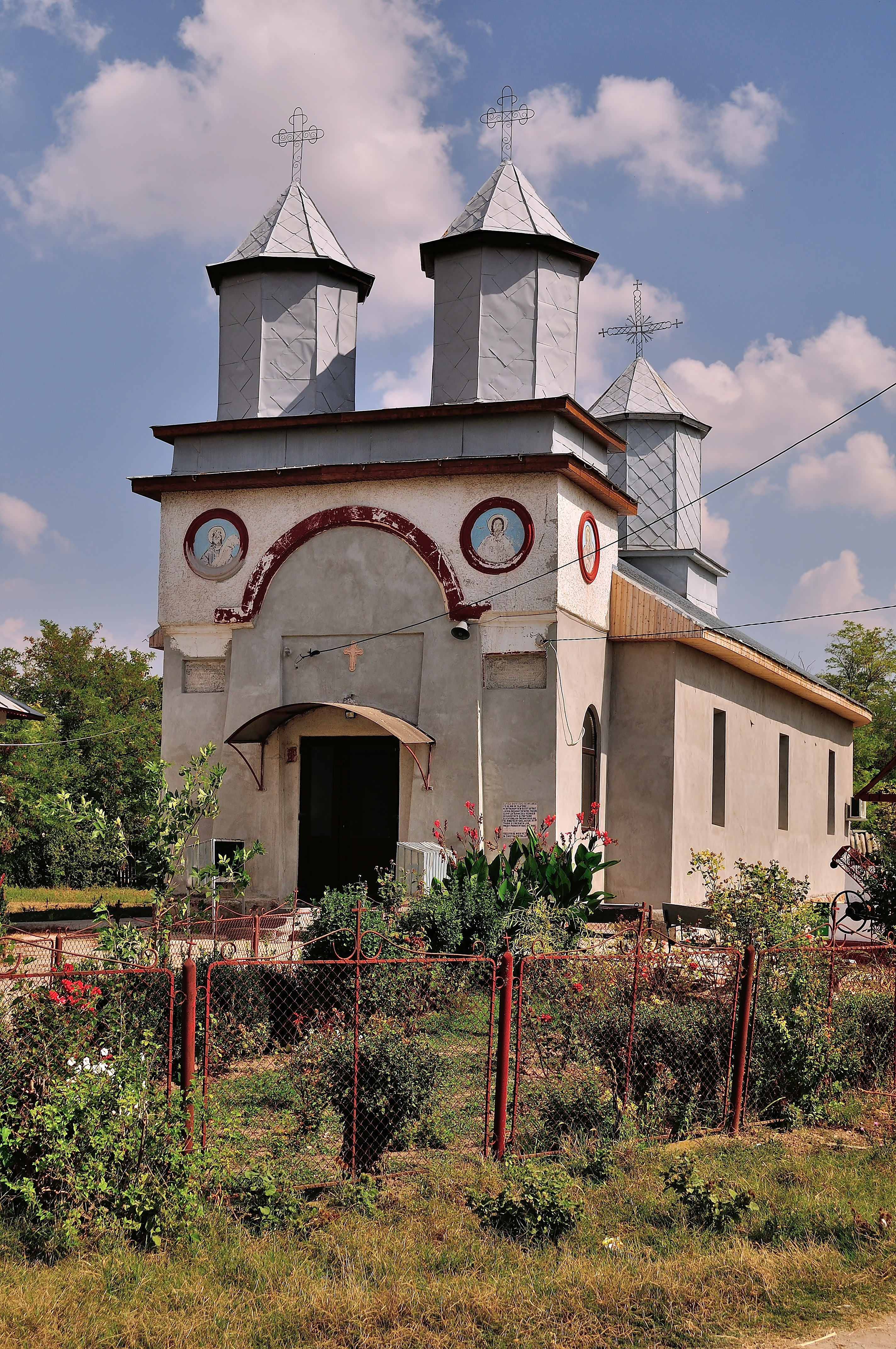 sat Varasti, comuna Dorobantu ,1838